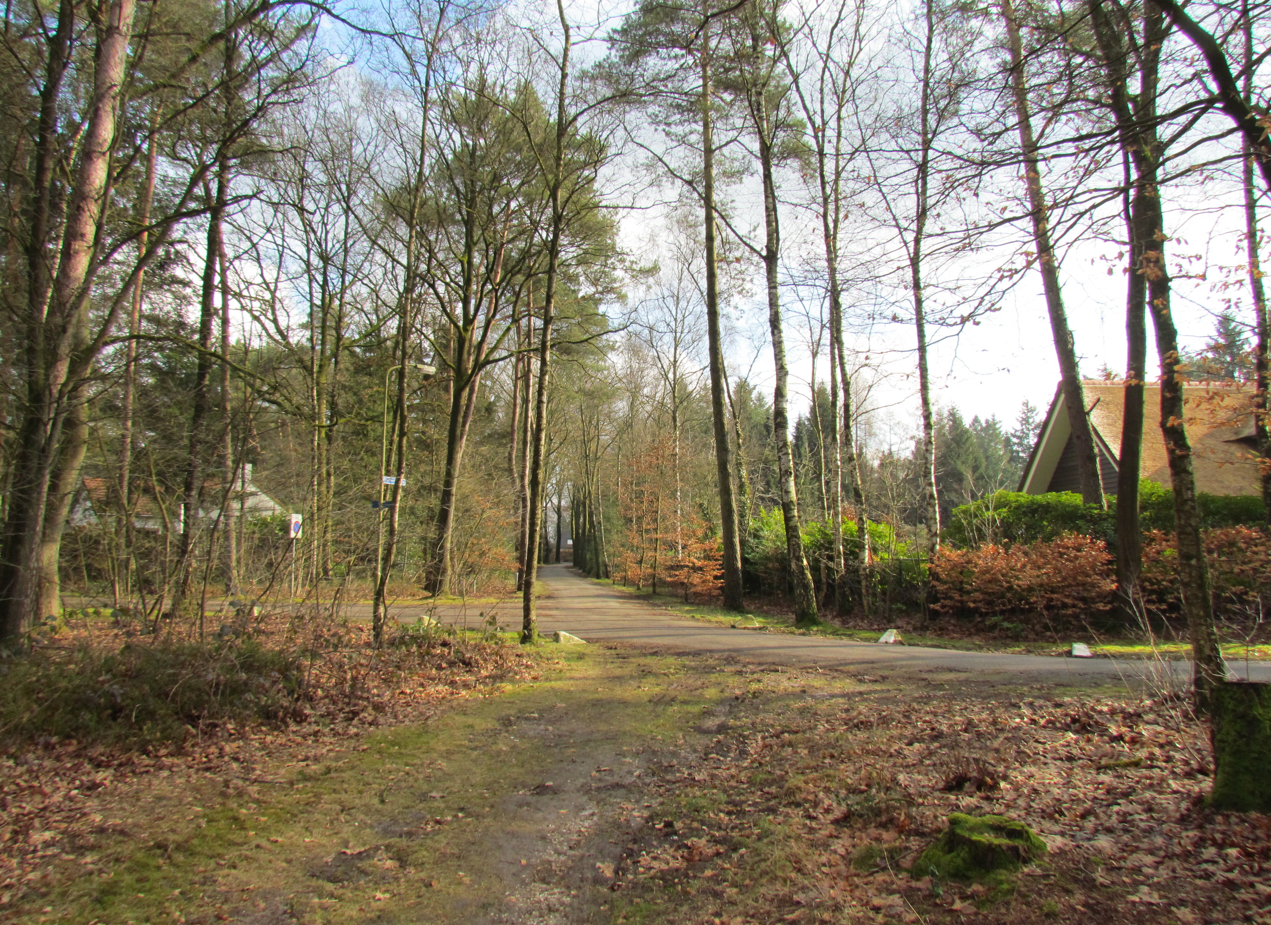 Bakhuisbos (buurtschap bij Heerde, NL). Berkenlaan/Sprengenweg